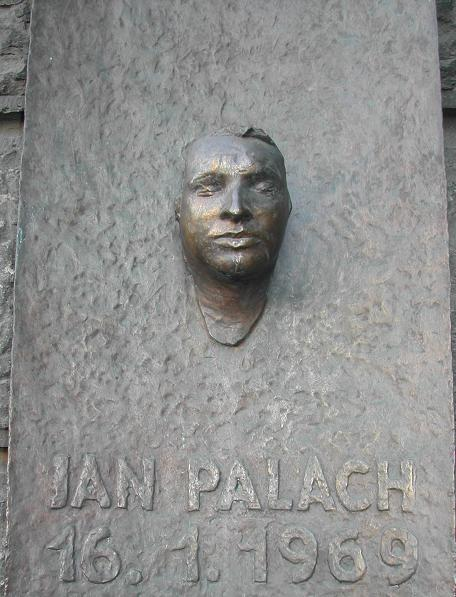 Jan Palach